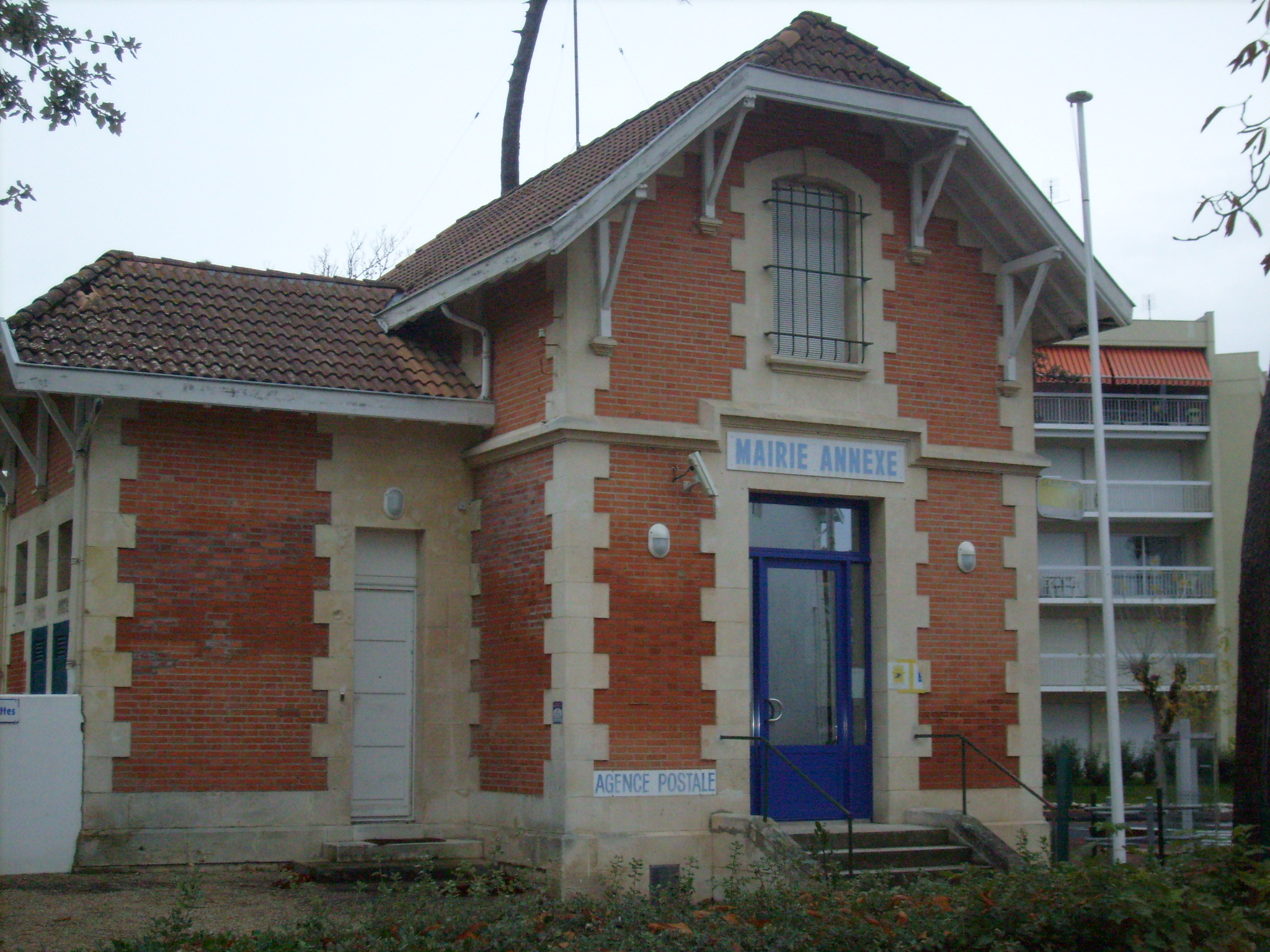 Mairie du Parc, Royan